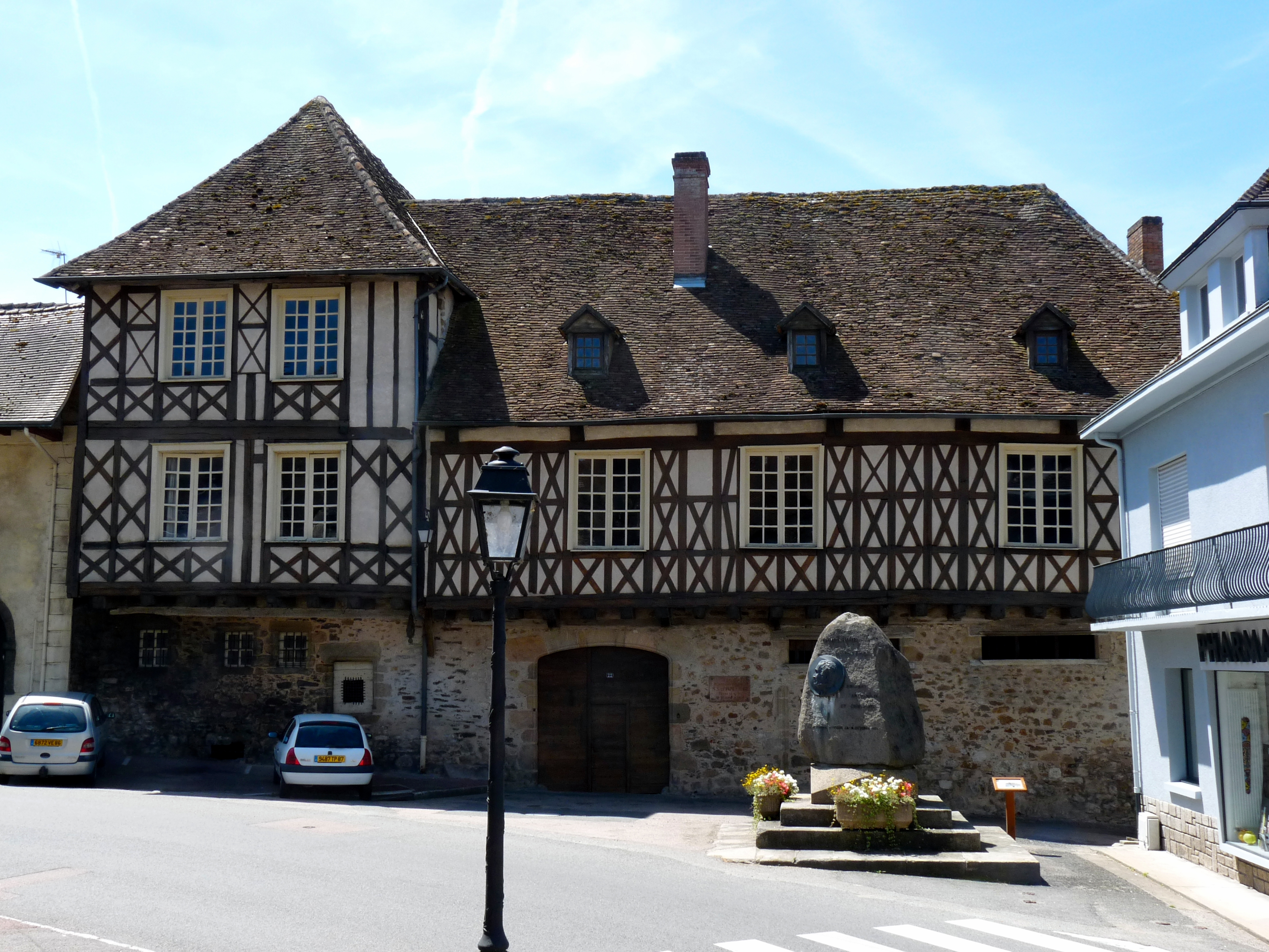 Hôtel des Trois Anges, 22 avenue de la République (Inscrit, 1981) .